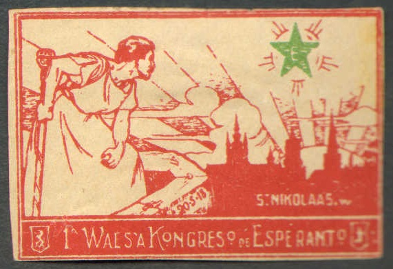 Glumarko (46 x 30 mm) anoncanta Esperanto-kongreson en Sint-Niklaas (regiono 'Waasland') je 20.5.1918 (dum la Unua Mondmilito. Pri tiu kongreso estas nur konata mallonga mencio en postmilita numero de Belga Esperantisto.